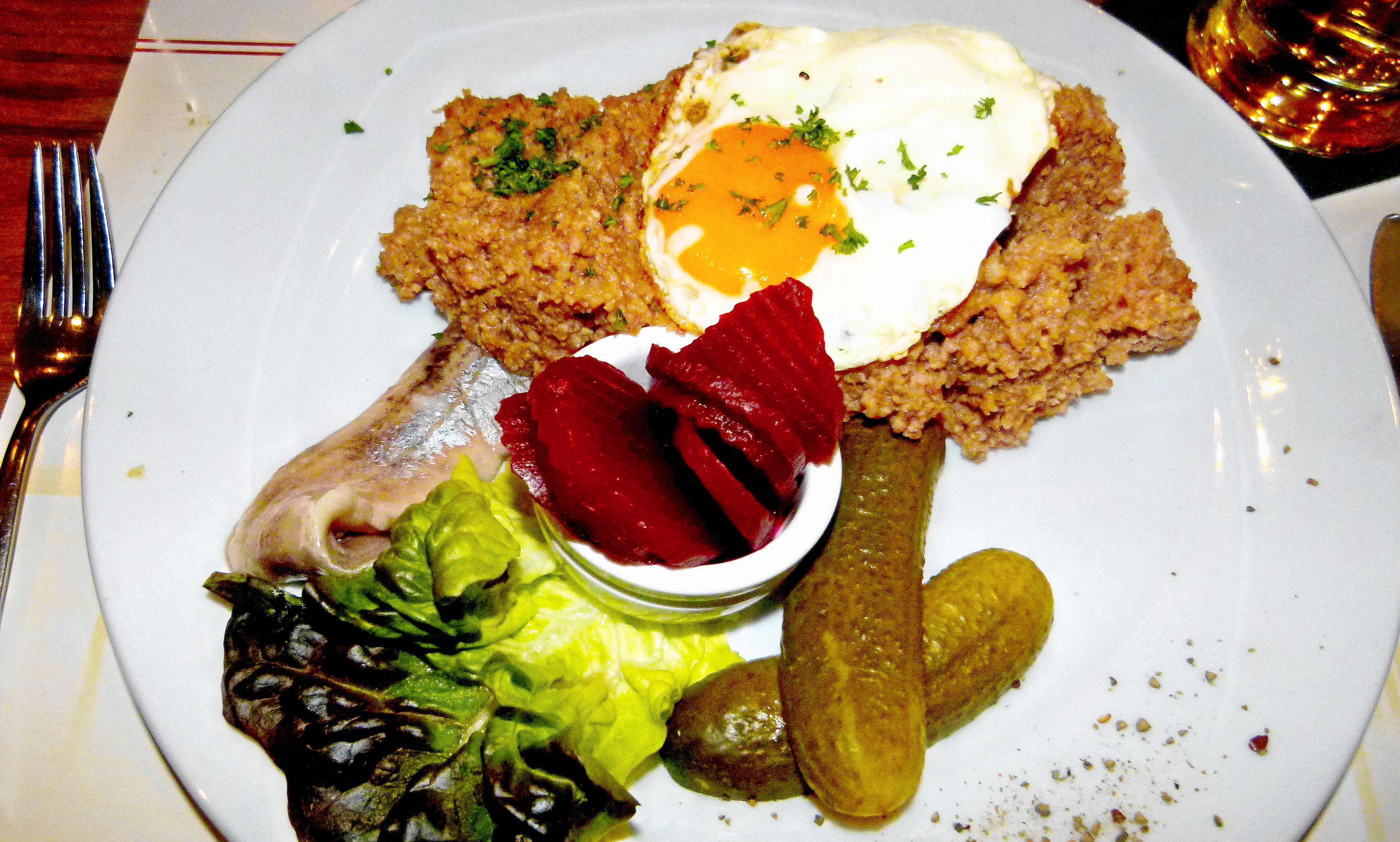 Labskaus in Bremen, Friesenhof in der Altstadt